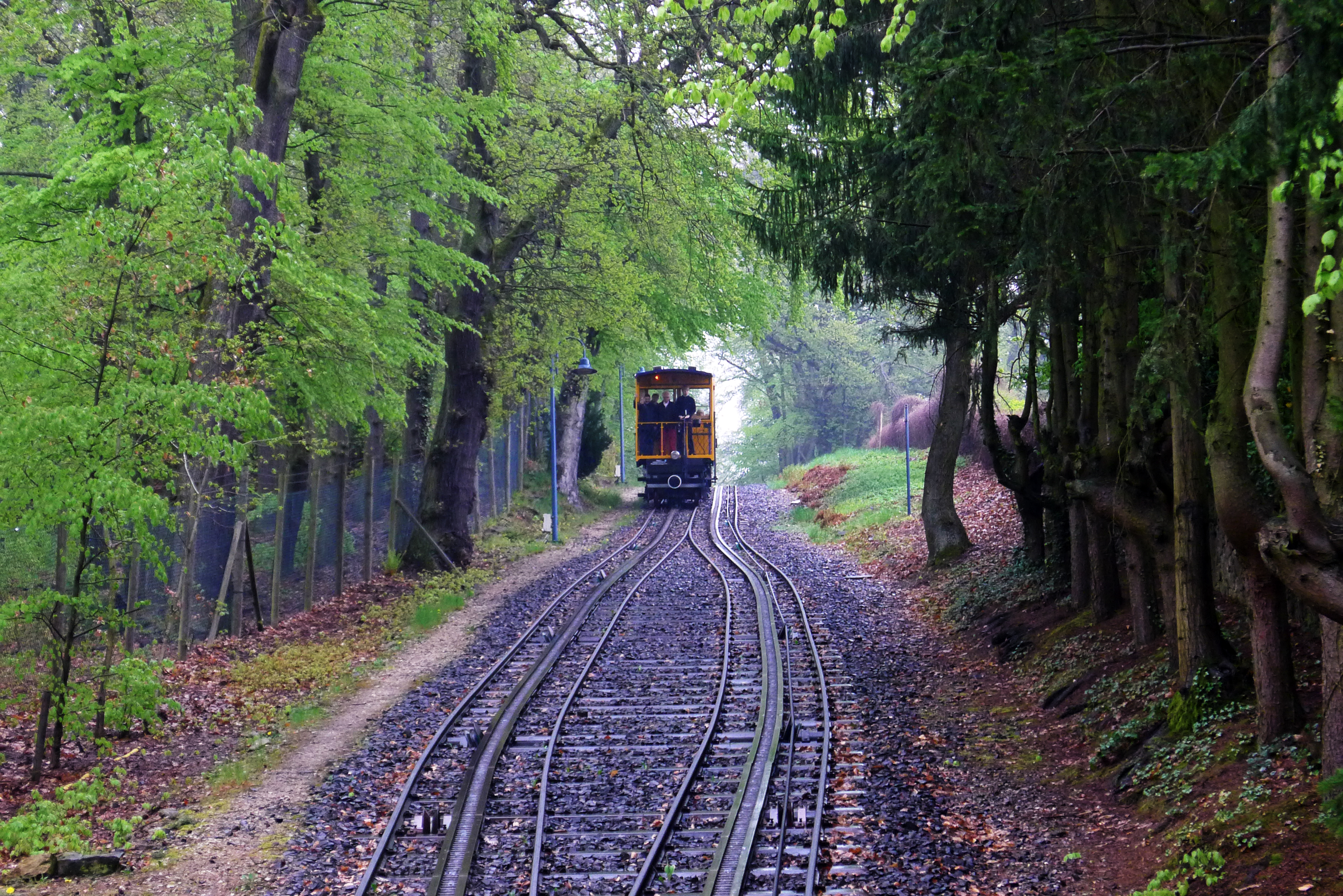 Nerobergbahn